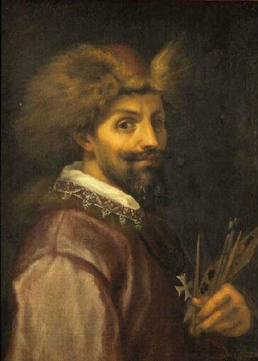 por su alumno